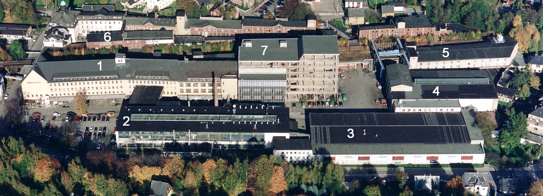 Luftbild von Werk 1 des VEB Waschgerätewerk Schwarzenberg aufgenommen ca. 8 Jahre nach dessen Auflösung. Verwendung der Gebäude bis 1990: 1: Hauptgebäude für Produktion 2: Lackiererei 3: Werkzeug- und Halbzeuglager 4: Stanzerei 5: Blechlager 6: Verwaltungsgebäude 7: neues Produktionsgebäude von ca. 1988 (bis zur Auflösung nicht in Betrieb gegangen)